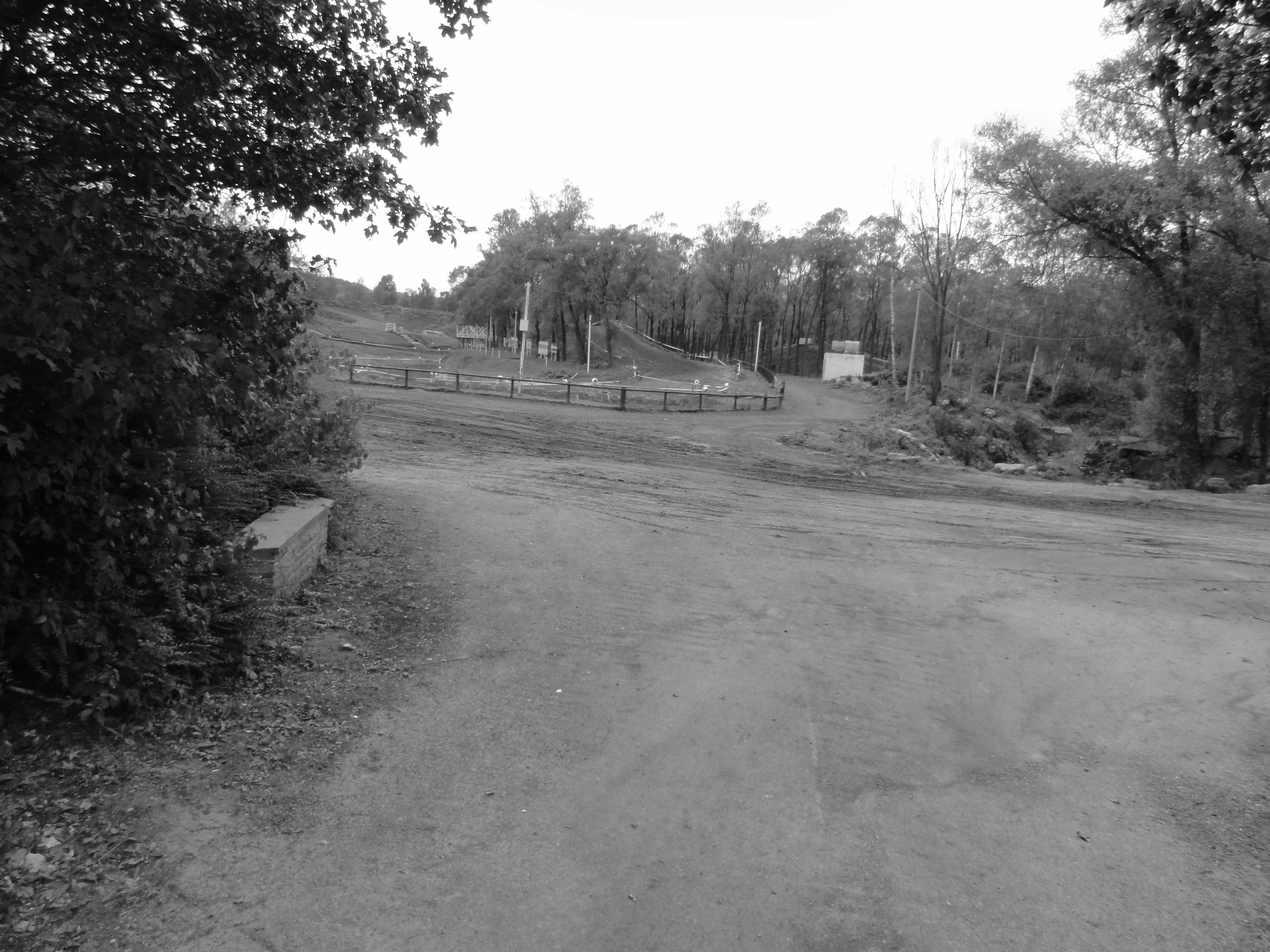 Terril n° 70A dit 3 - 4 de Meurchin Ouest chemin des îles, fosse n° 3 - 4 de la Compagnie des mines de Meurchin, Douvrin et Wingles, Pas-de-Calais, Nord-Pas-de-Calais, France.